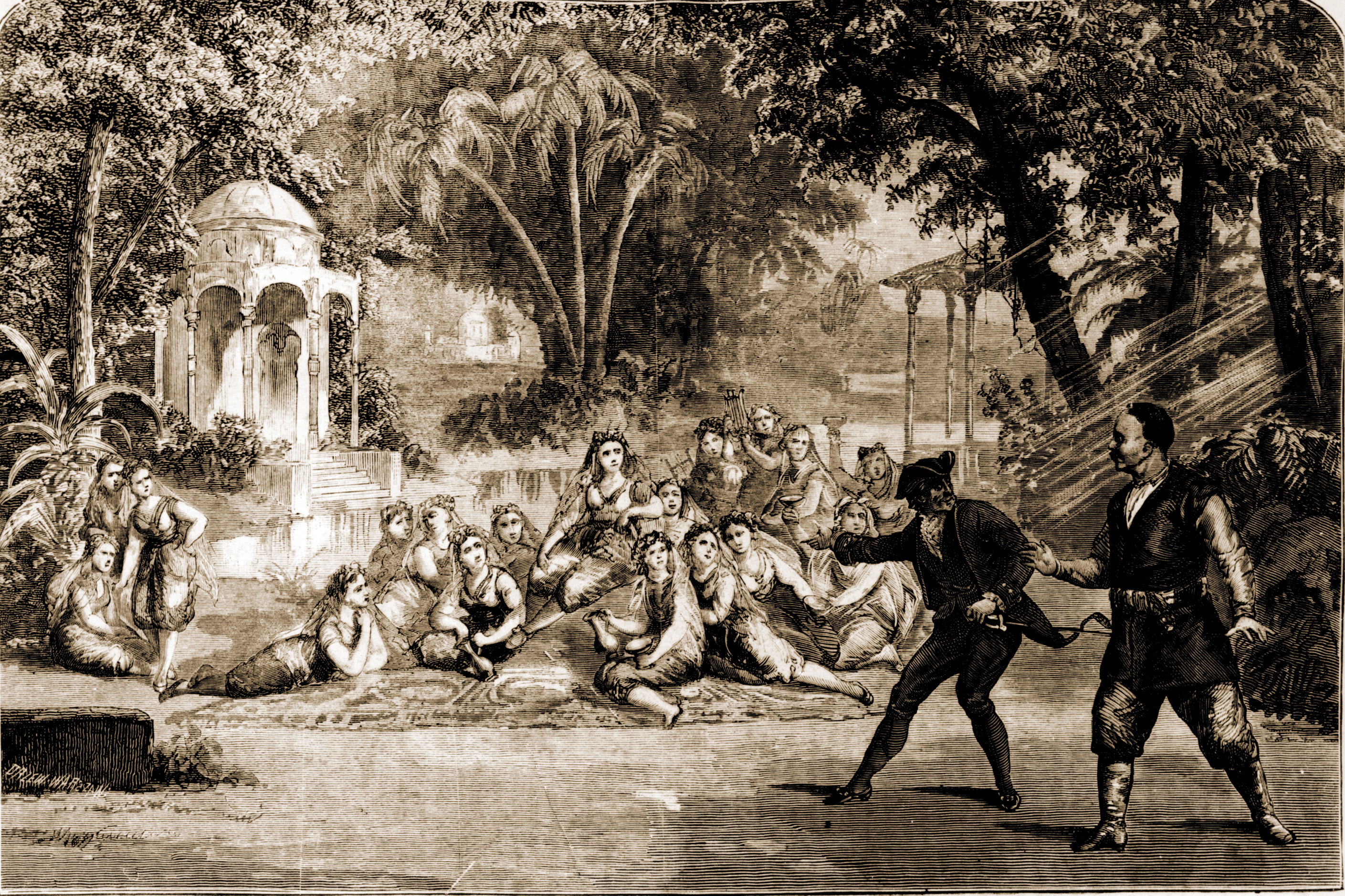 Scena z polskiego baletu narodowego "Pan Twardowski" w choreografii Virgilio Caloriego, Teatr Wielki w Warszawie, 1874, rys. Franciszek Tegazzo, „Tygodnik Ilustrowany”, 1874 nr 341.